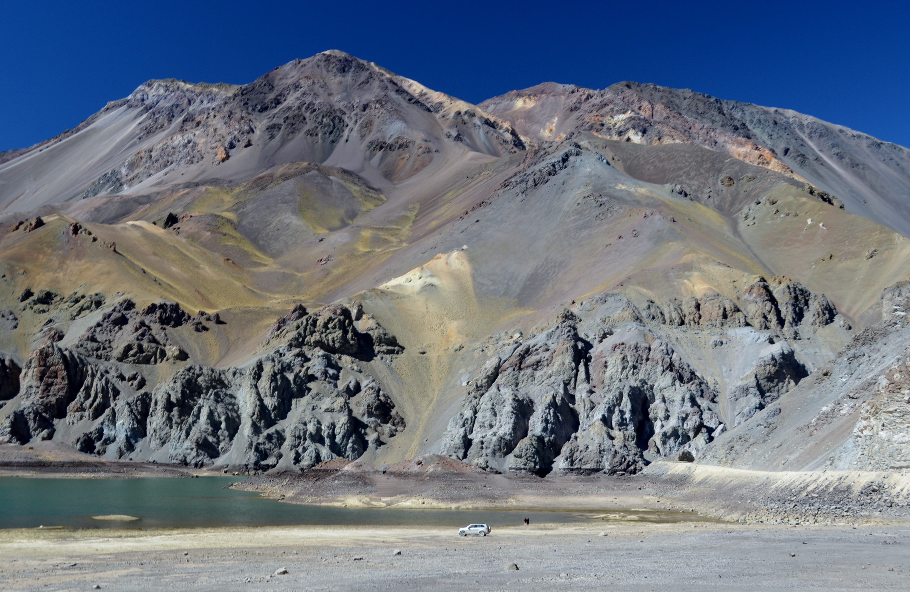 Emb. la Laguna